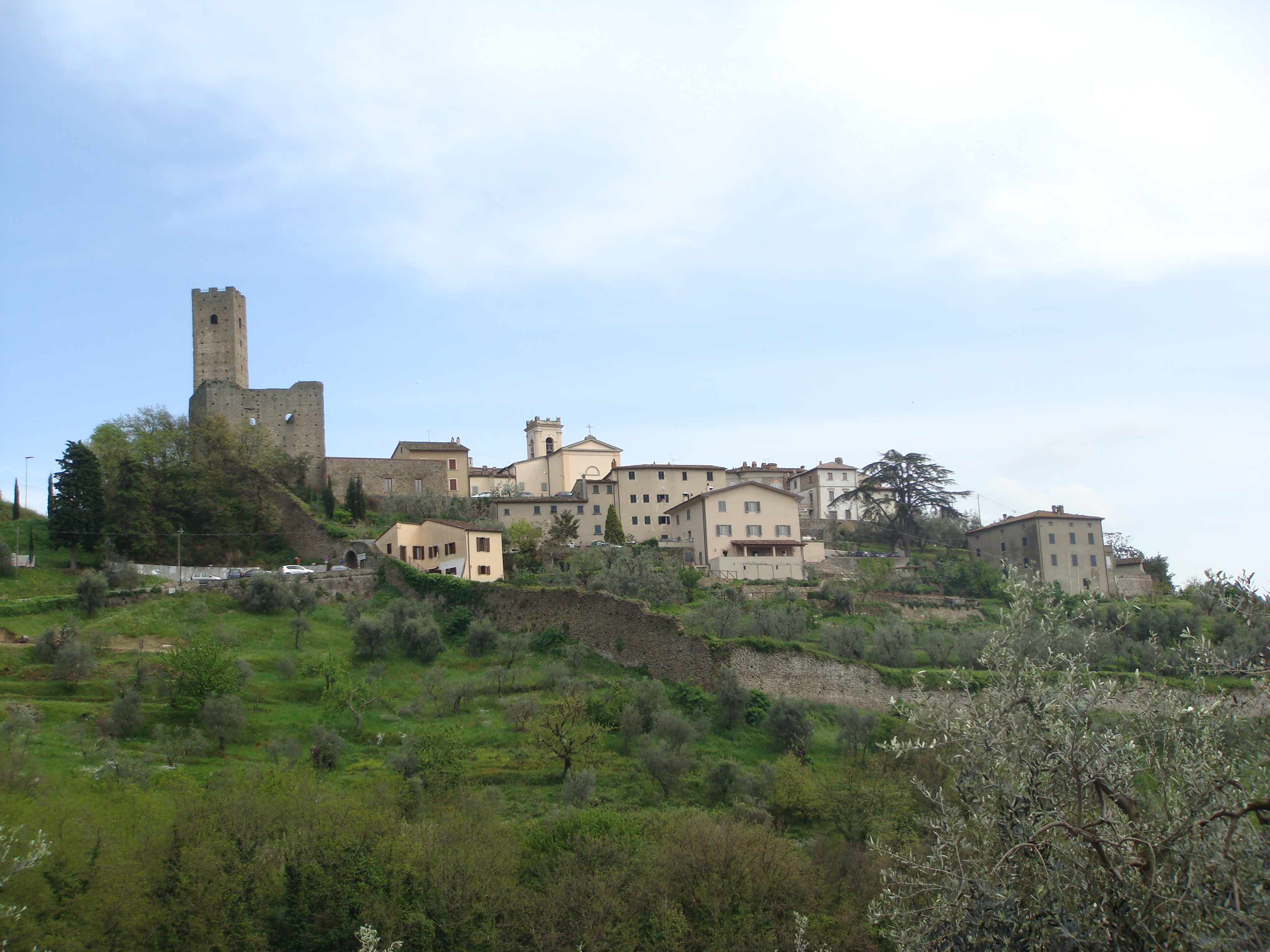 Veduta di Larciano Castello (Provincia di Pistoia, Italia)